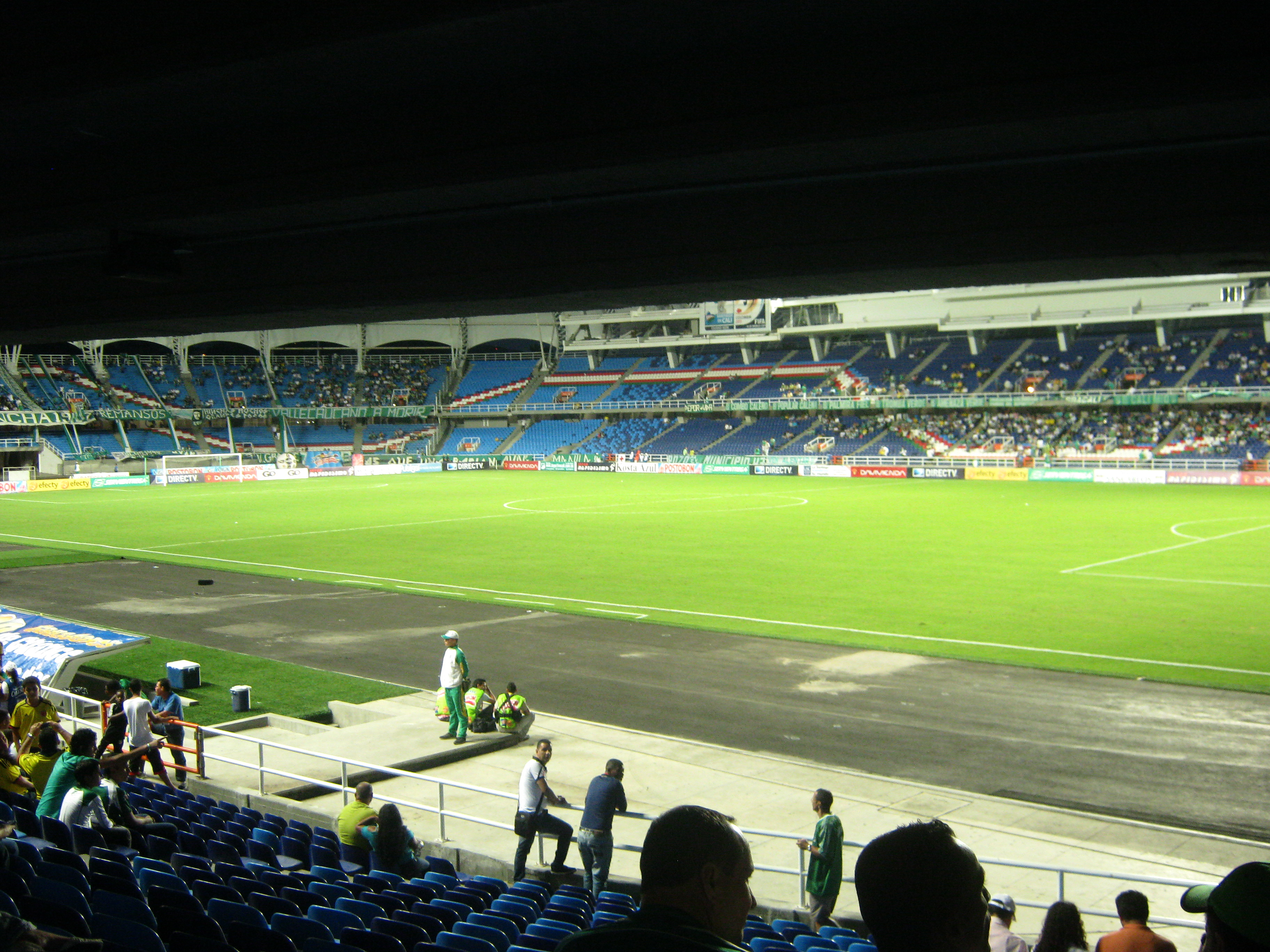 Entretiempo del encuentro amistoso de la Selección Colombia sub 17 contra la Selección de Costa Rica sub 17 en el Pascual Guerrero. Previo al partido por la 12° fecha entre el Deportivo Cali y el Quindío